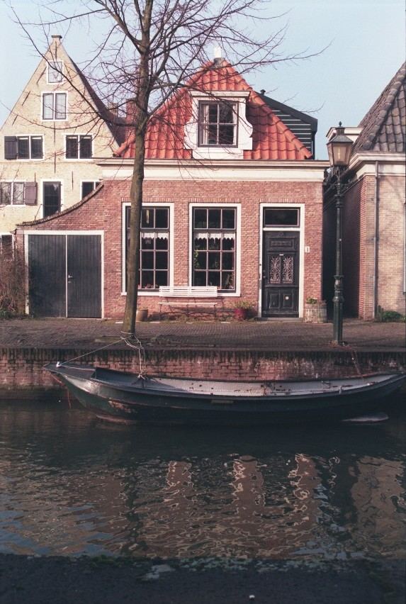 Hoorn, Venidse 1